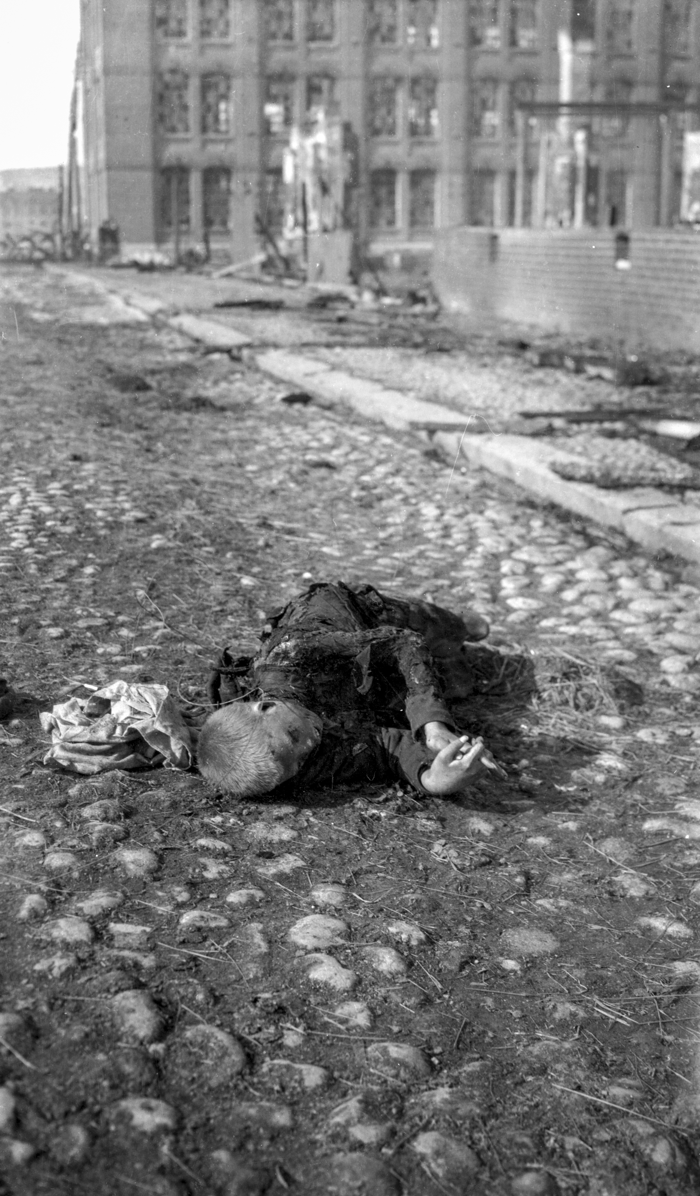 Kuvauspaikka on Suvantokatu lähellä Aleksanterinkadun risteystä. Taustalla Verkatehdas. CC-BY Tampere 1918, kuvaaja Oscar Sundberg, Vapriikin kuva-arkisto. Finnish Civil War 1918, Photographer Oscar Sundberg, Vapriikki Photo Archives.